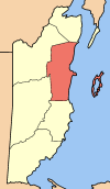 Belize district, Belize